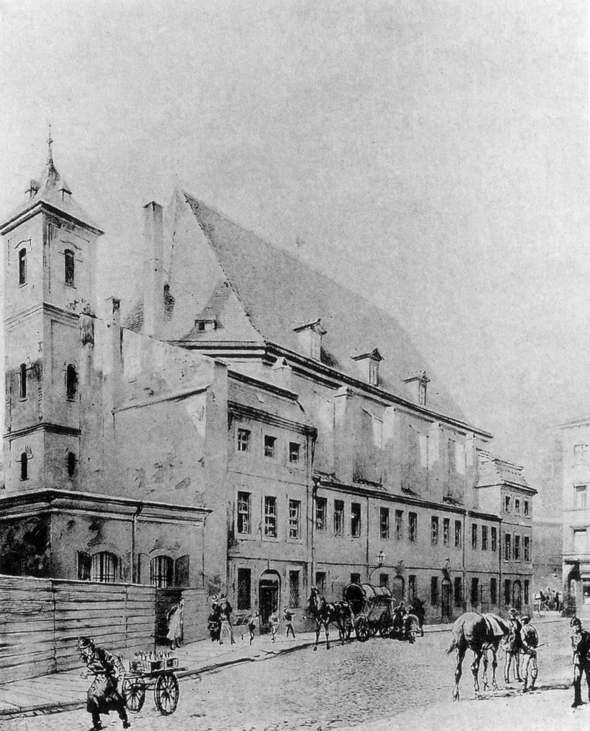 Alte Peterskirche Leipzig, Ansicht von Nordosten. Eventuell Druck nach einem Aquarell.